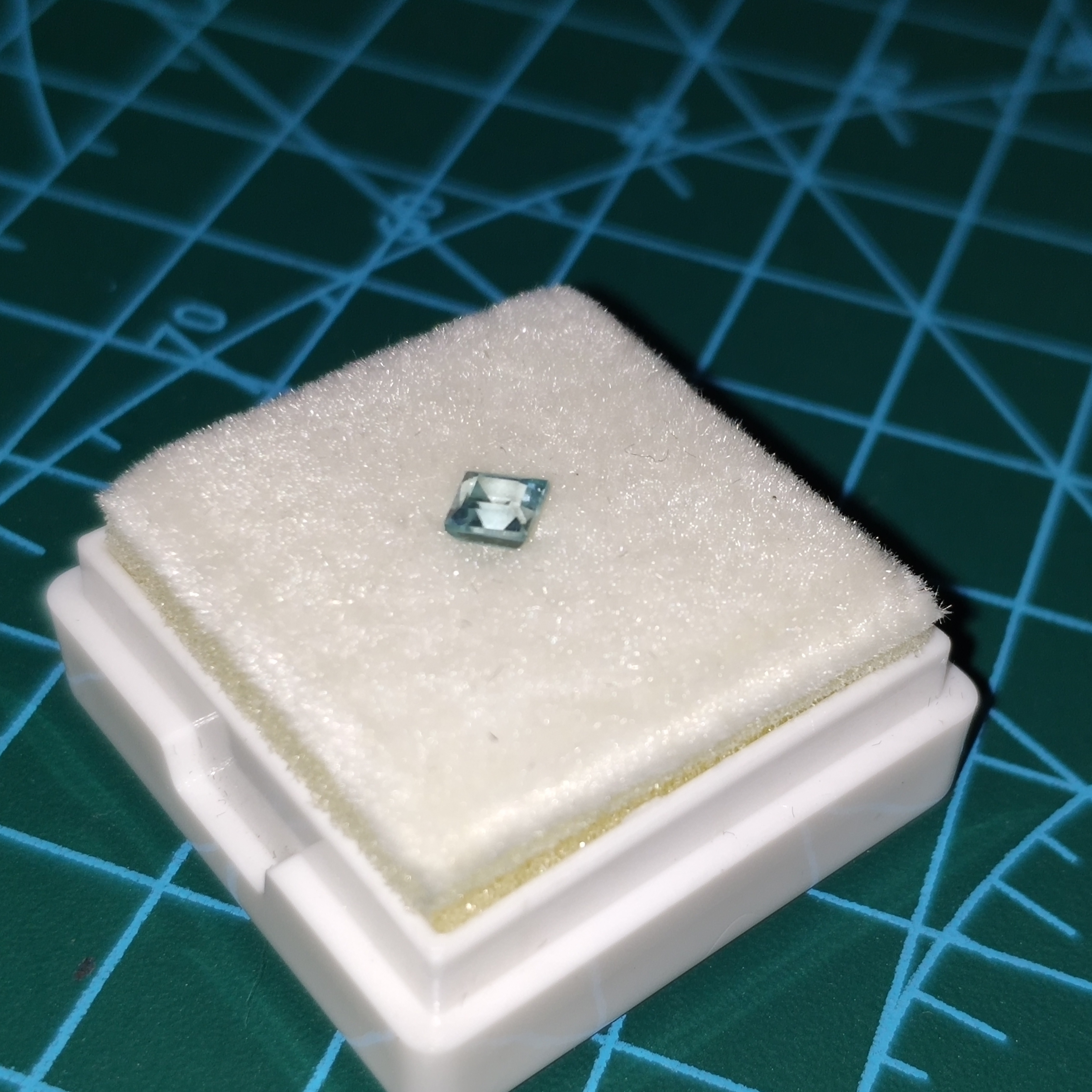 0.45cts宝石级锆石，在光线照射下呈蓝绿色半透明